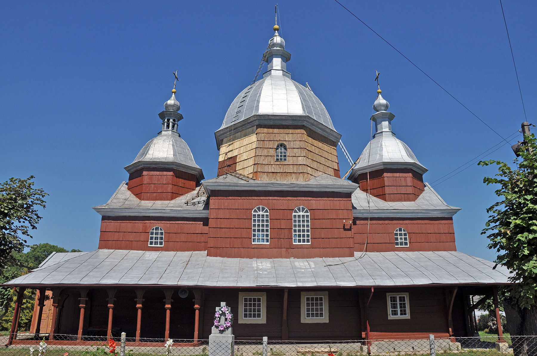 Церква Св. арх. Михаїла (дер.), Кізлів